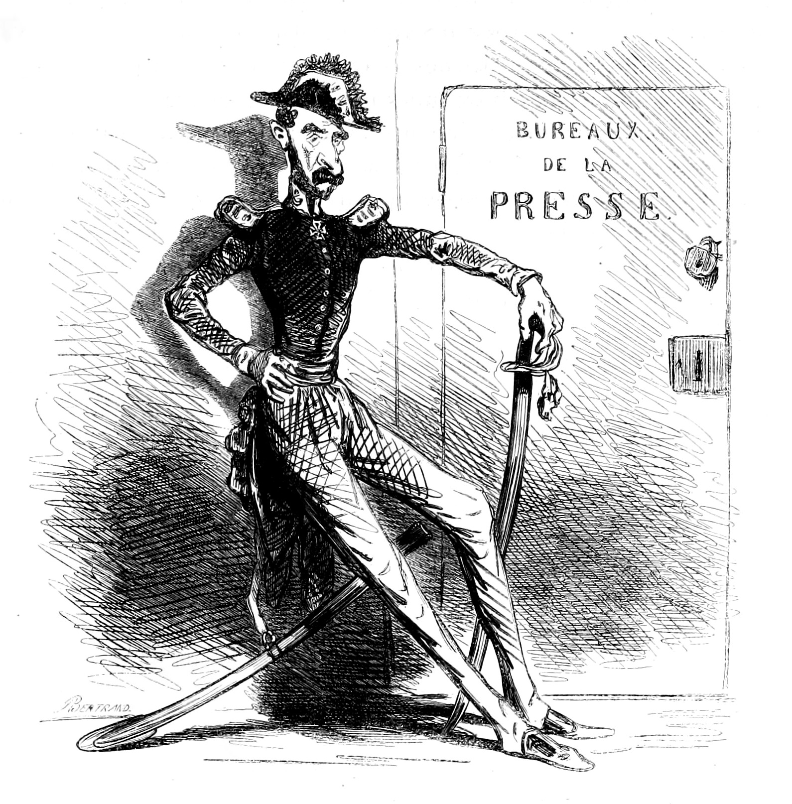 Caricature du général Cavaignac (1802-1857) par Cham.